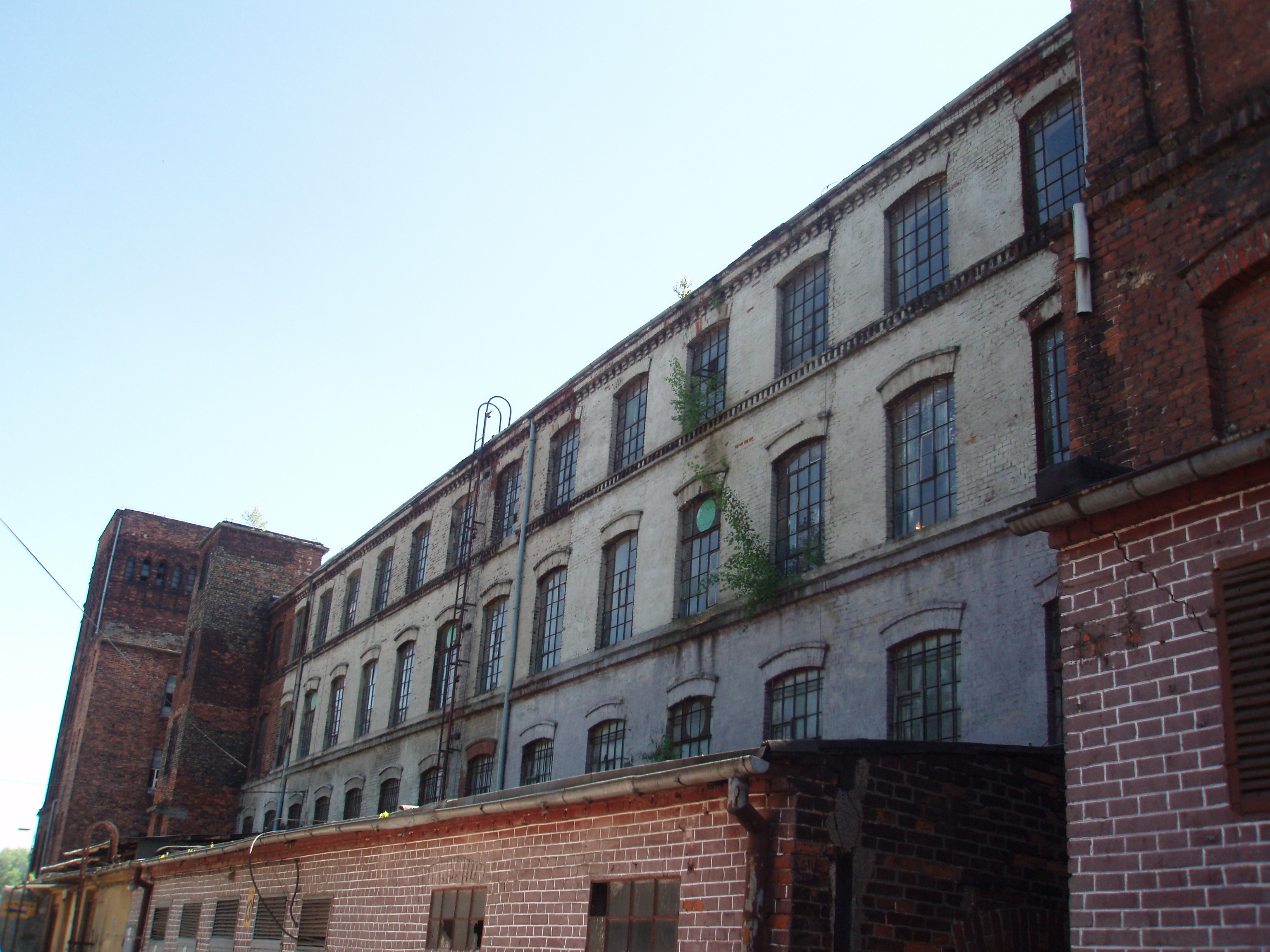 Obiekt w kompleksie przemysłowym przy ul. Rzgowskiej 26/28